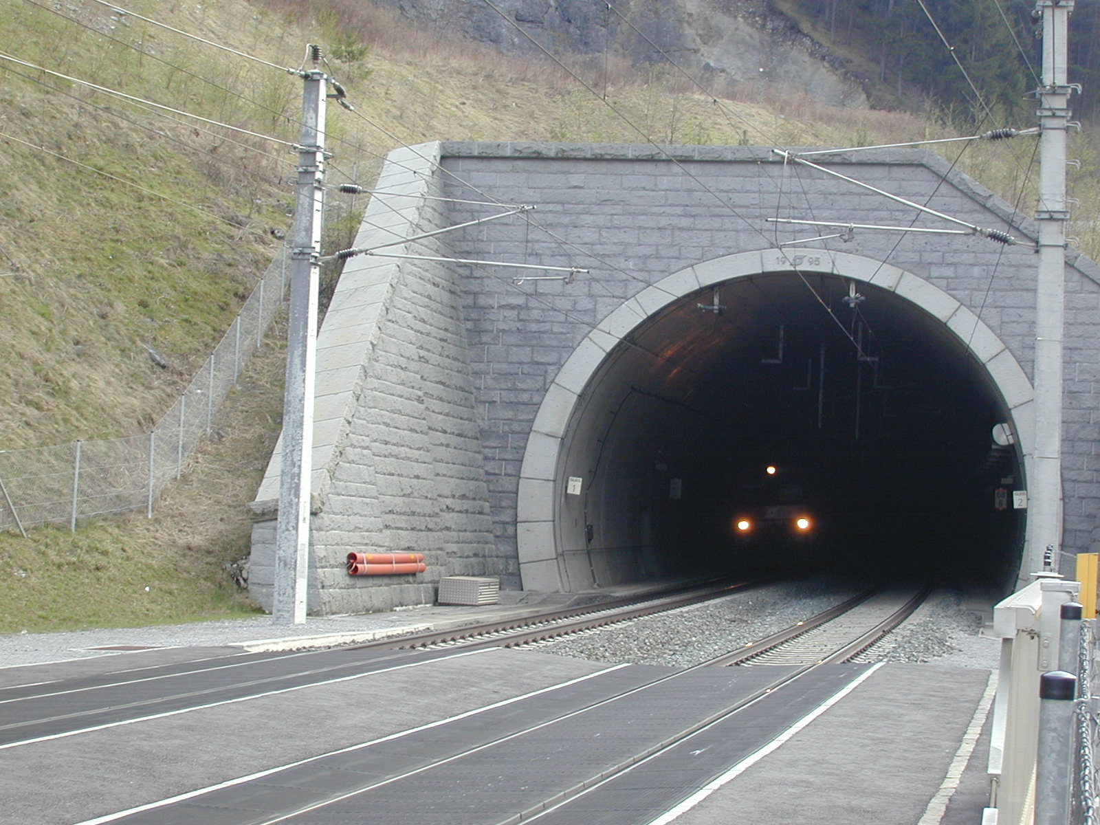 Zammer Tunnel, Ostportal mit E 1539 nach Innsbruck Hbf